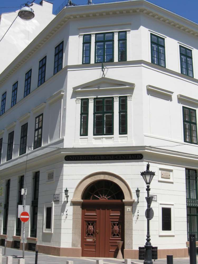 Közép-európai Egyetem – Central European University (Budapest, V. ker., Nádor utca 9.)